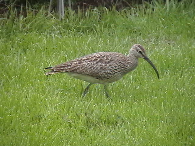 Tók myndina sjálfur. is:Spói